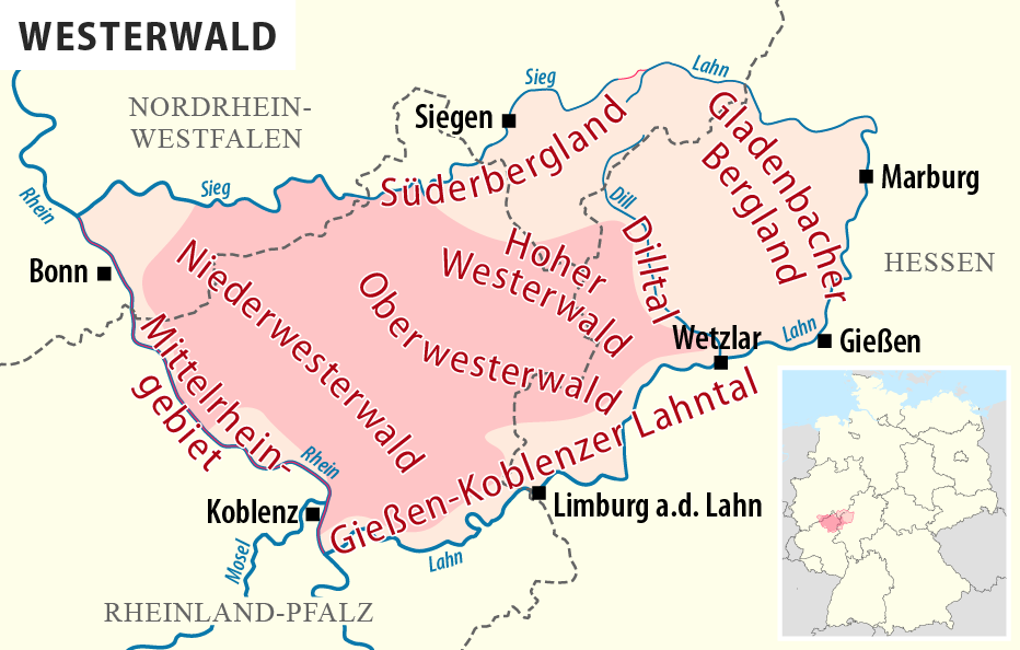 Karte der Naturräume des Westerwalds, etwas dunkler hervorgehoben der Westerwald im engeren Sinne